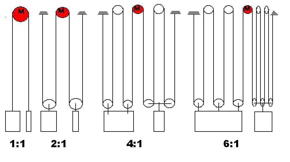 Seilaufhängungsarten, Korrigierte Bezeichnung